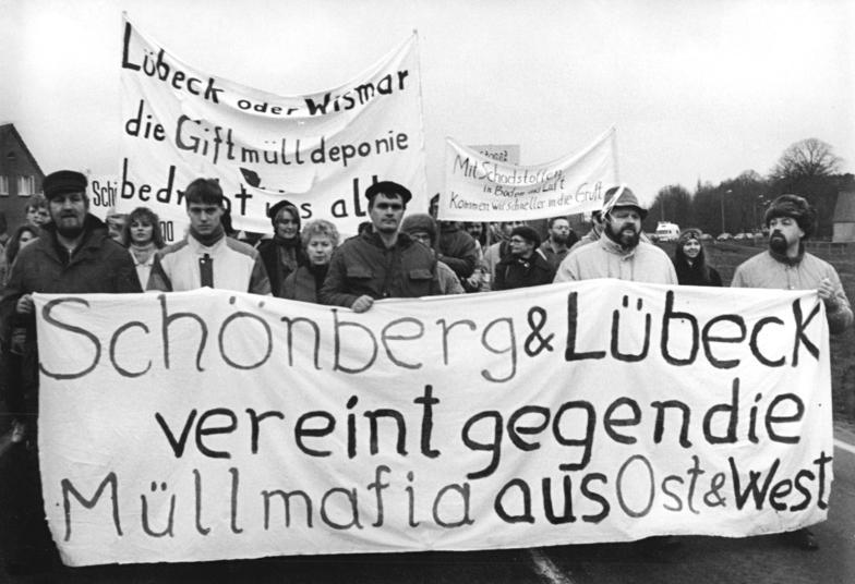 ADN-ZB Pätzold-27.1.90 Bez. Rostock: Umweltschützer aus beiden deutschen Staaten folgten dem Aufruf verschiederner Umweltgruppen und Bürgerinitiativen aus Lübeck, Schwerin und Wismar zur Mülldeponie Schönberg (Kreis Grevesmühlen) zu demonstrieren, die als größte Giftmülldeponie Europas gilt.